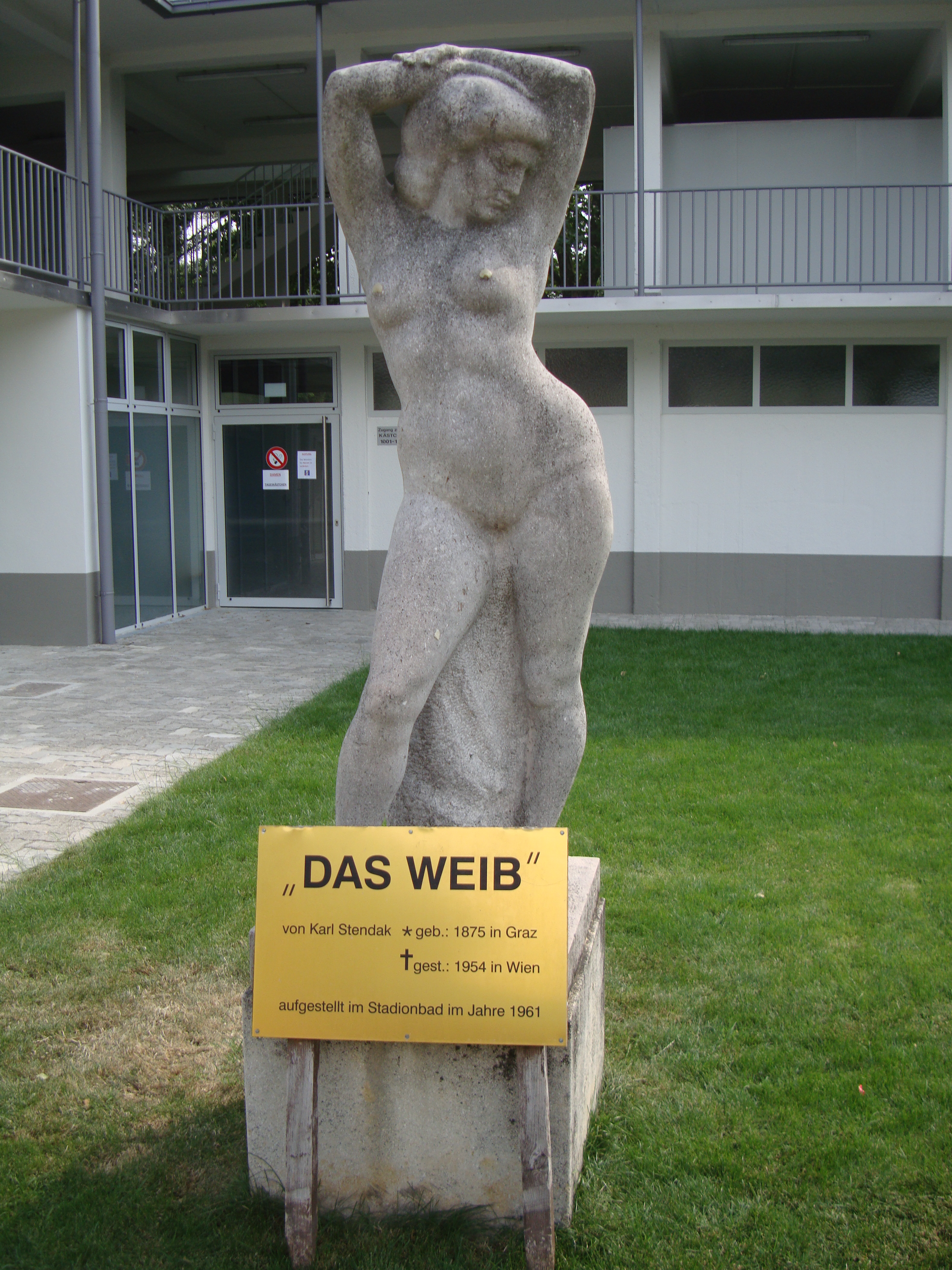 Stadionbad Wien, Plastik "Das Weib"